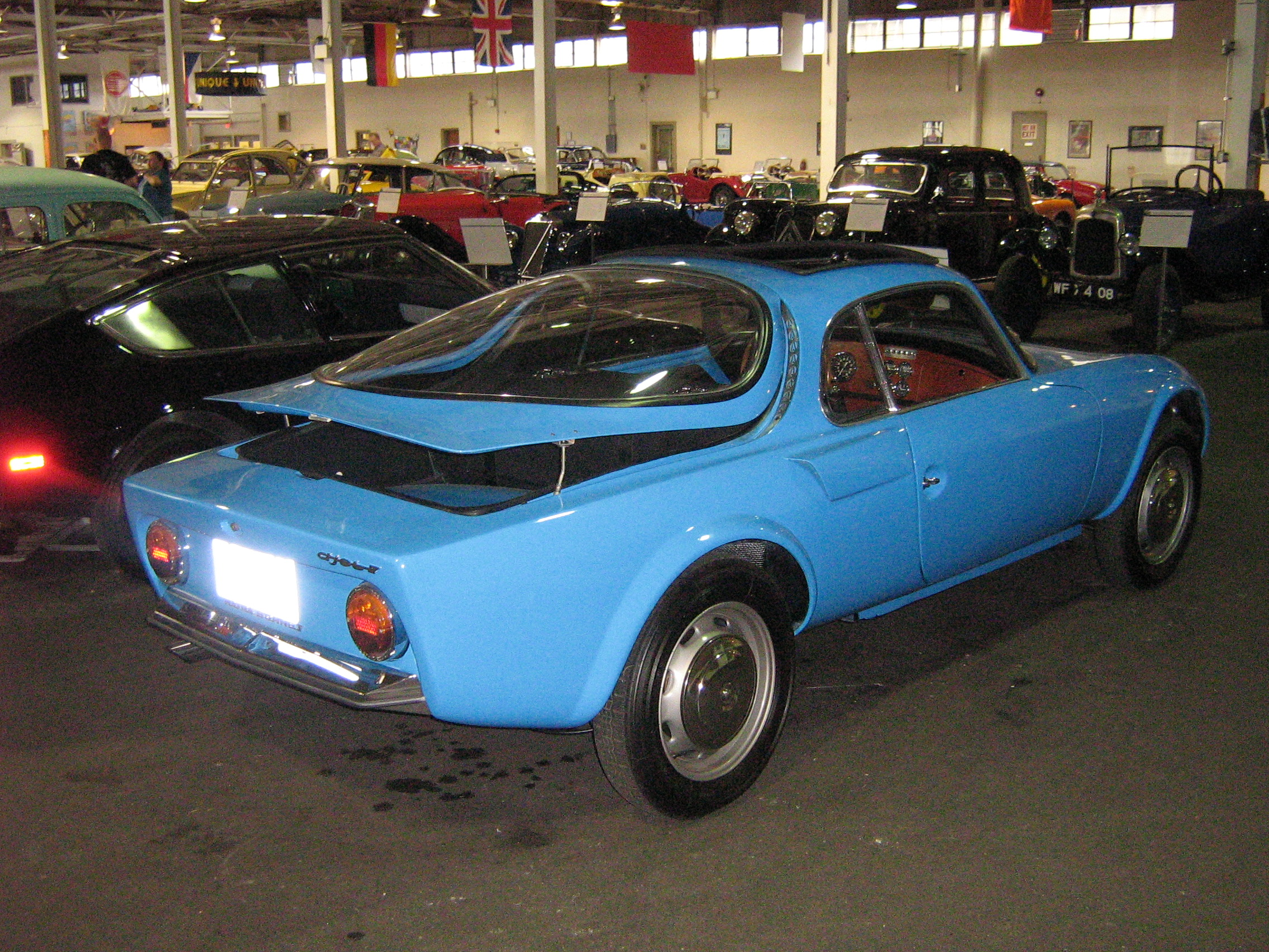 1965 Matra D-Jet 5